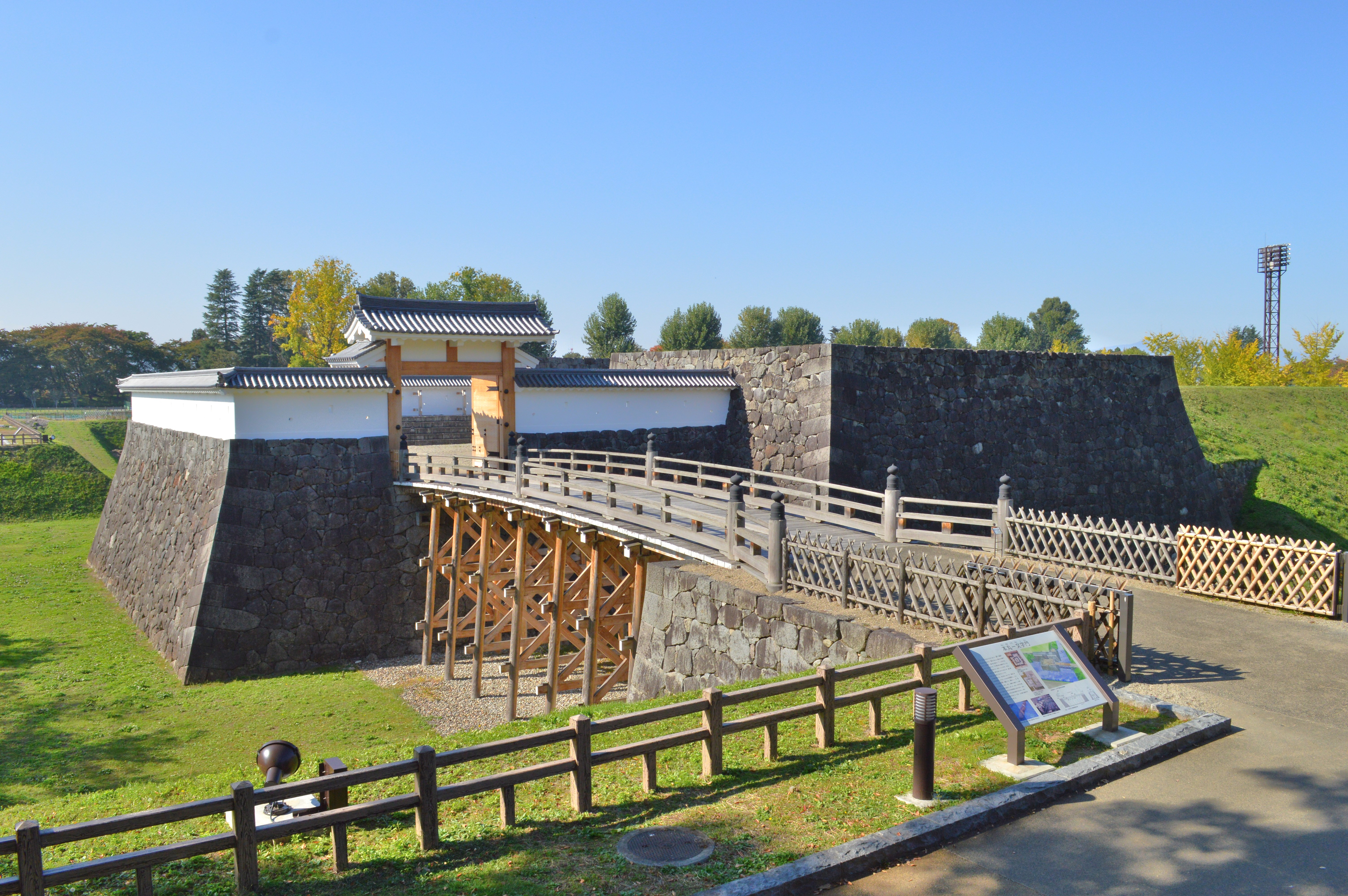 山形城 復元本丸石垣